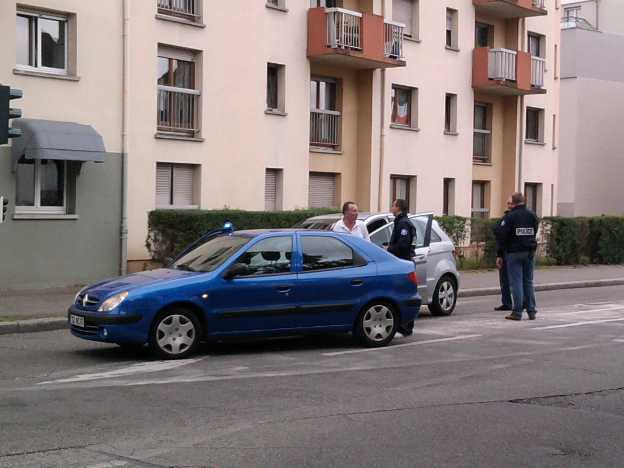 Policiers en civil intevenant à Strasbourg